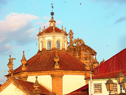 Igreja da Madalena (Chaves - Portugal)